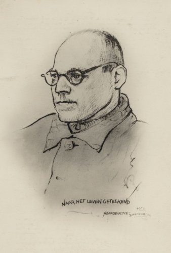 Gerrit Jan Laagwater, prisoner in Vught 1943